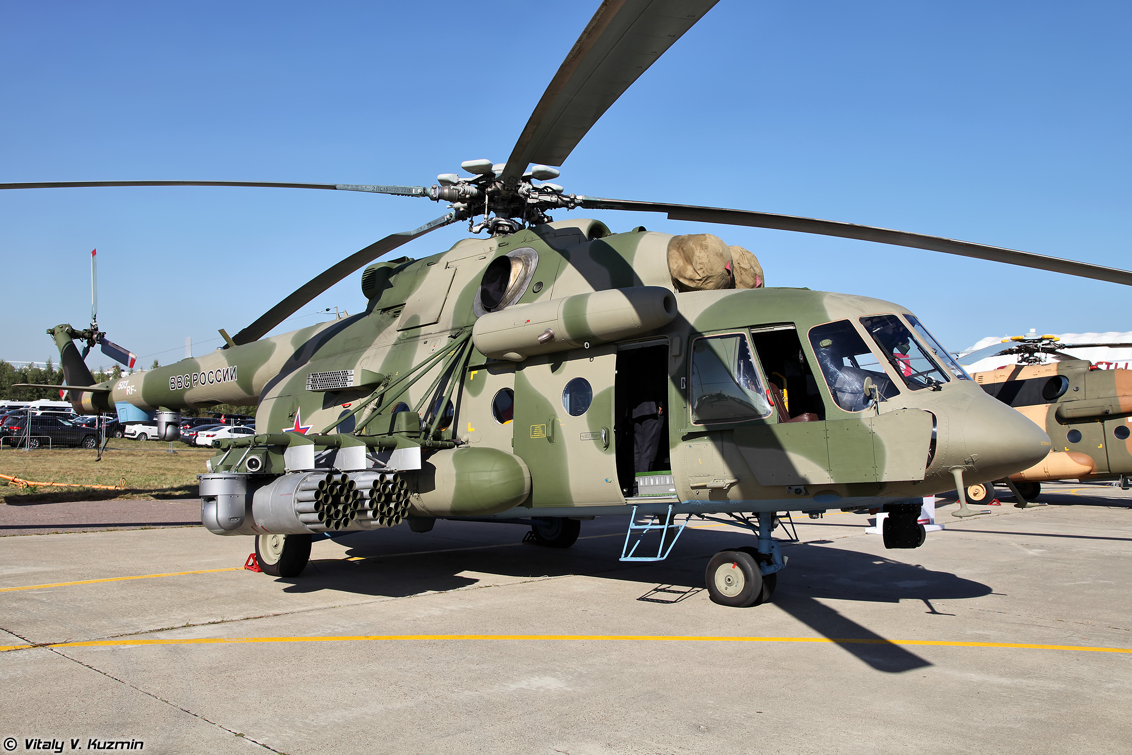 Ми-8АМТШ с бортовым комплексом обороны Л370Э8 Витебск (Mi-8AMTSh with on-board defense system L370E8 Vitebsk)